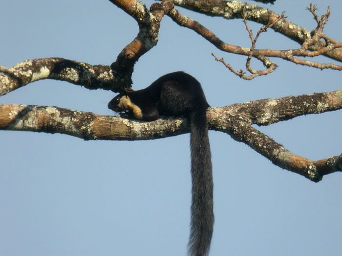 Kaeng Krachan, Thailand, 16 Feb 2007